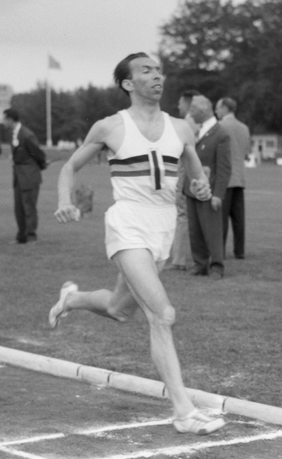 Landenatletiekwedstrijden Nederland tegen Belgie te Bergen op Zoom. Roger Moens (Belgie) wint de 800 meter